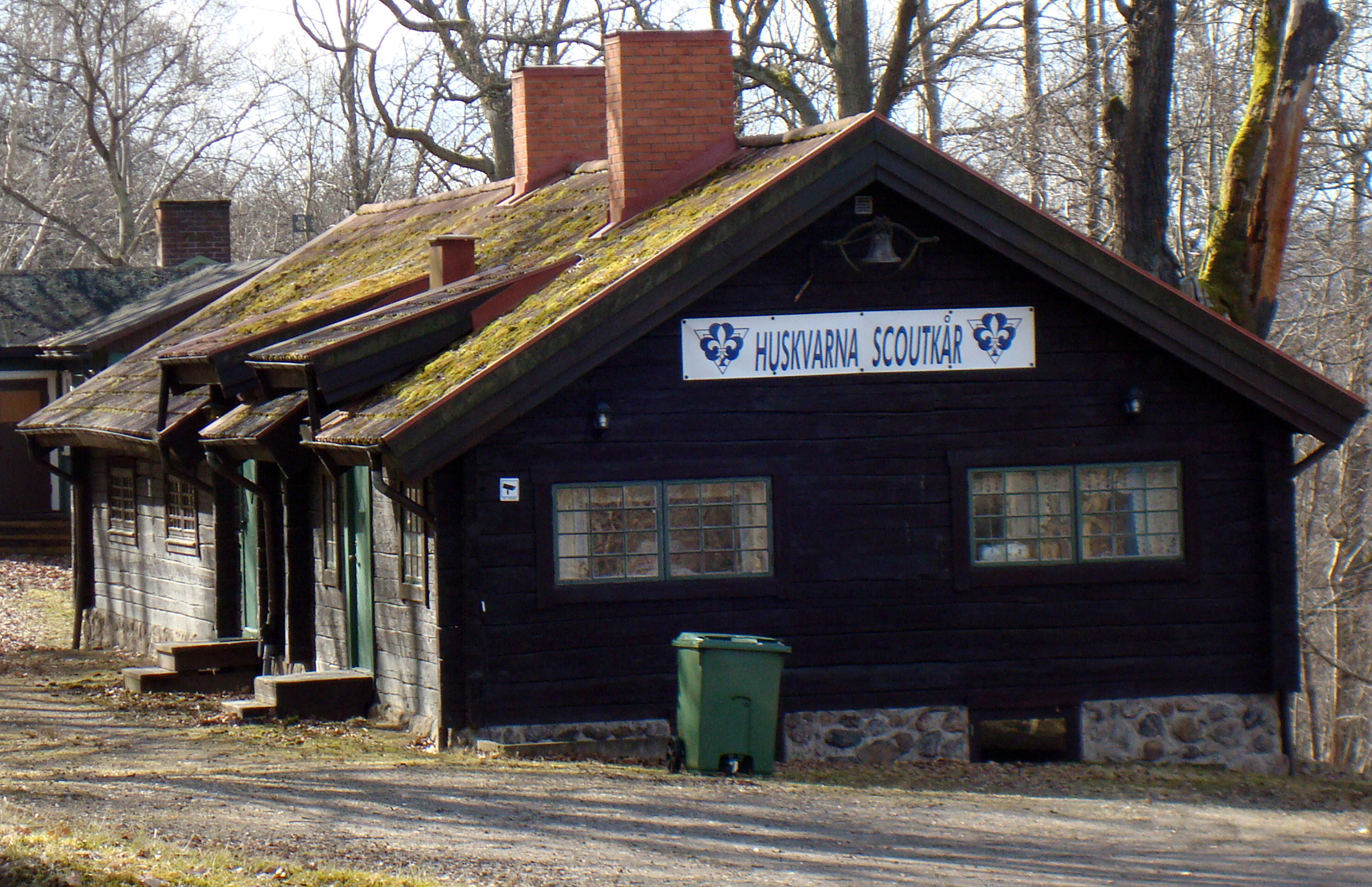 I Örjansgården har Huskvarna Scoutkår länge huserat